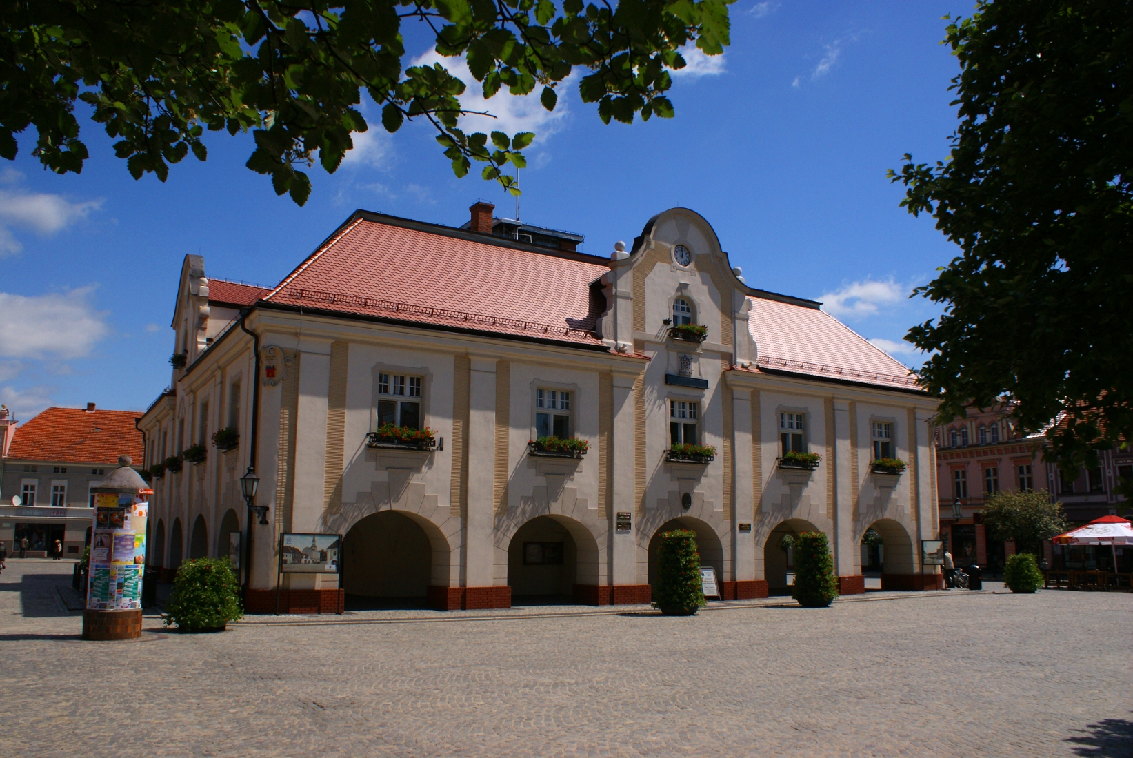 Ratusz w Jarocinie